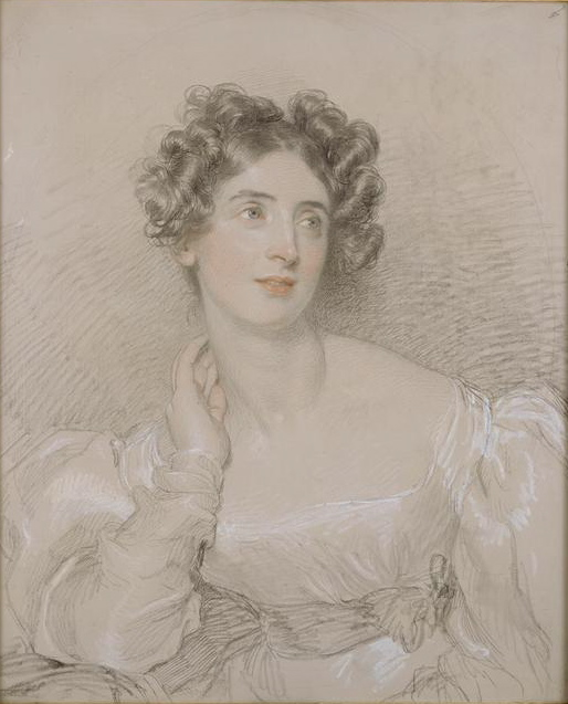 Madame Ducrest de Villeneuve, née Antoinette Sophie Laure Duvaucel